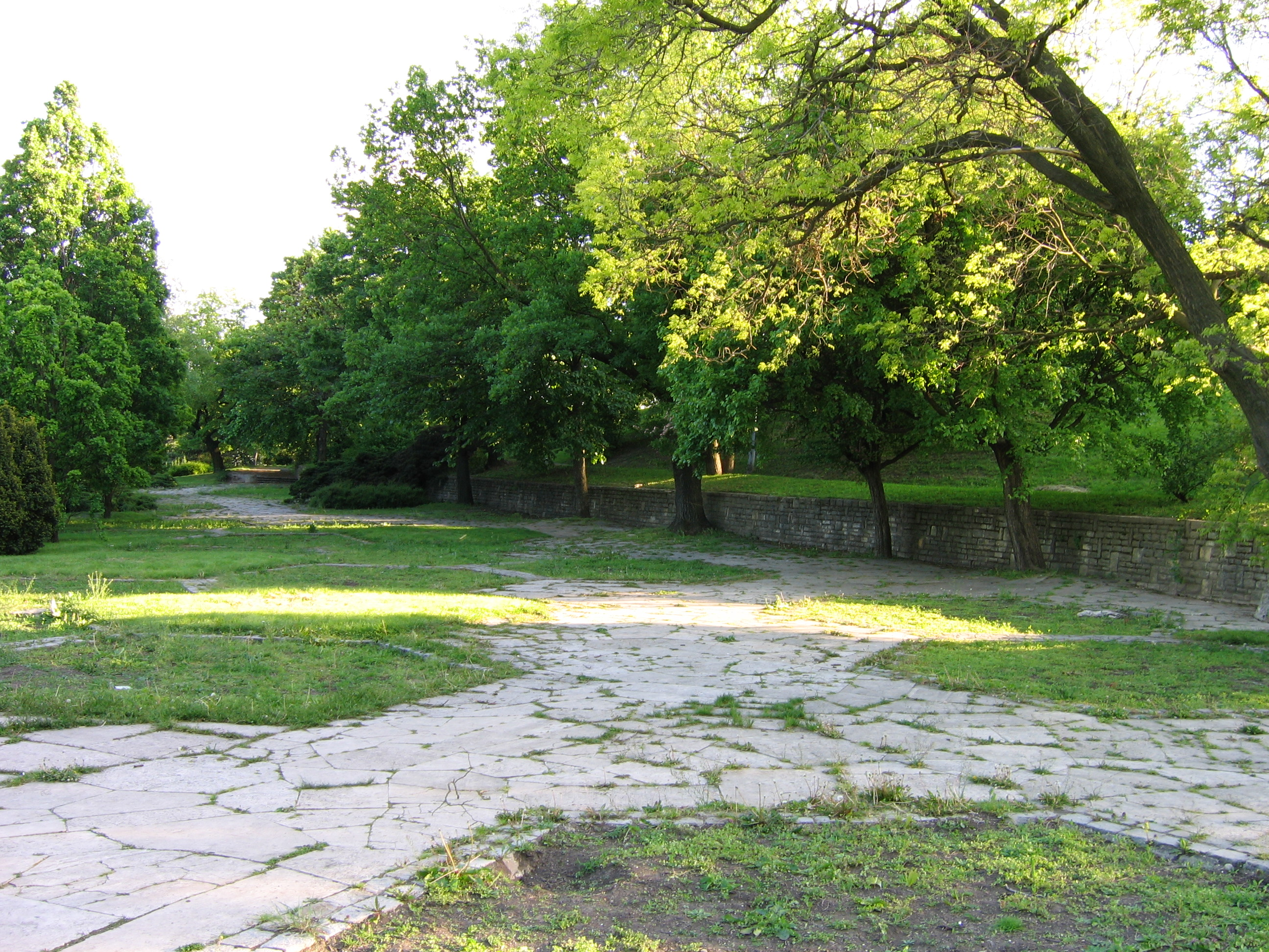 Gellért Hill ((Gellérthegy)) Budapest, Hungary